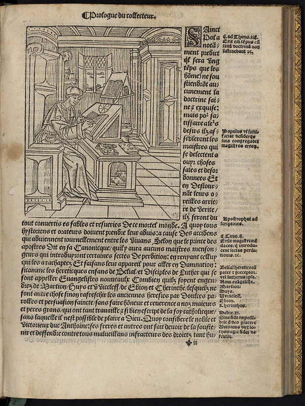 Il s'agirait d'une représentation de l'auteur écrivant à son pupitre, par le graveur lorrain Gabriel Salmon. Gravure sur bois de fil sur papier vergé. 128 x 104 mm (trait carré).